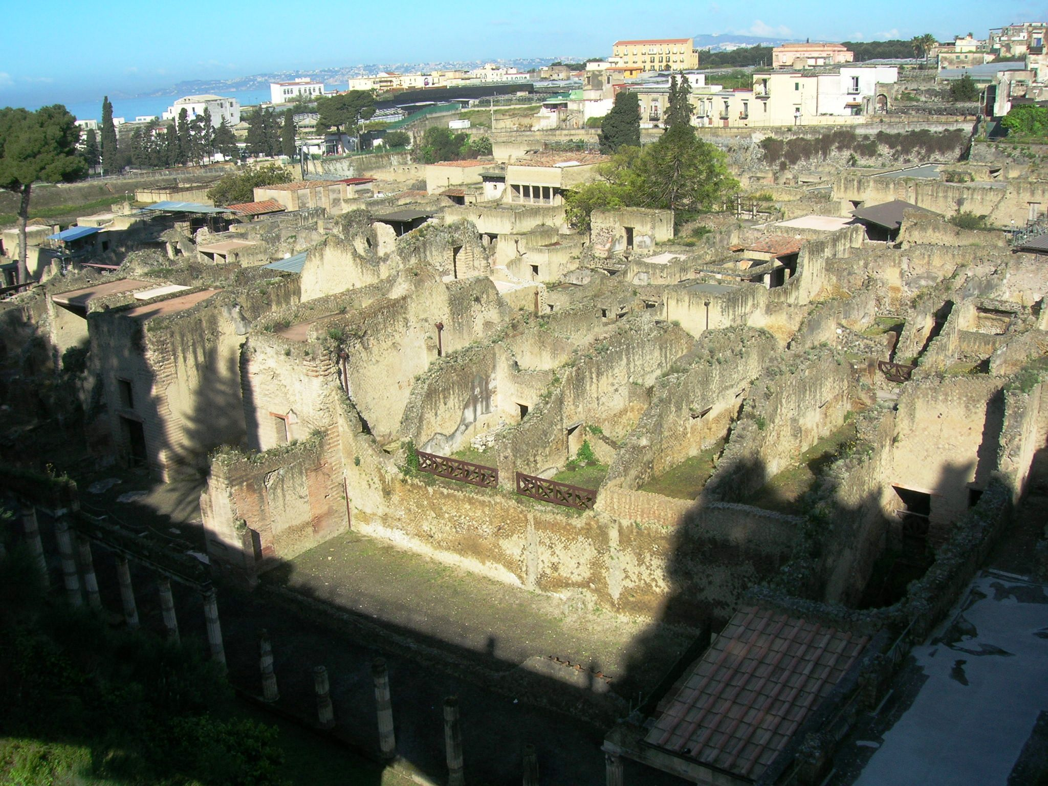 Veduta degli scavi archeologici di Ercolano